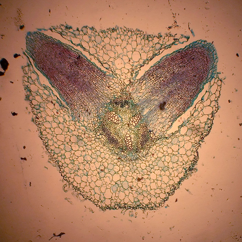 Seitenwurzelbildung bei der Erbse (Lichtmikroskop)